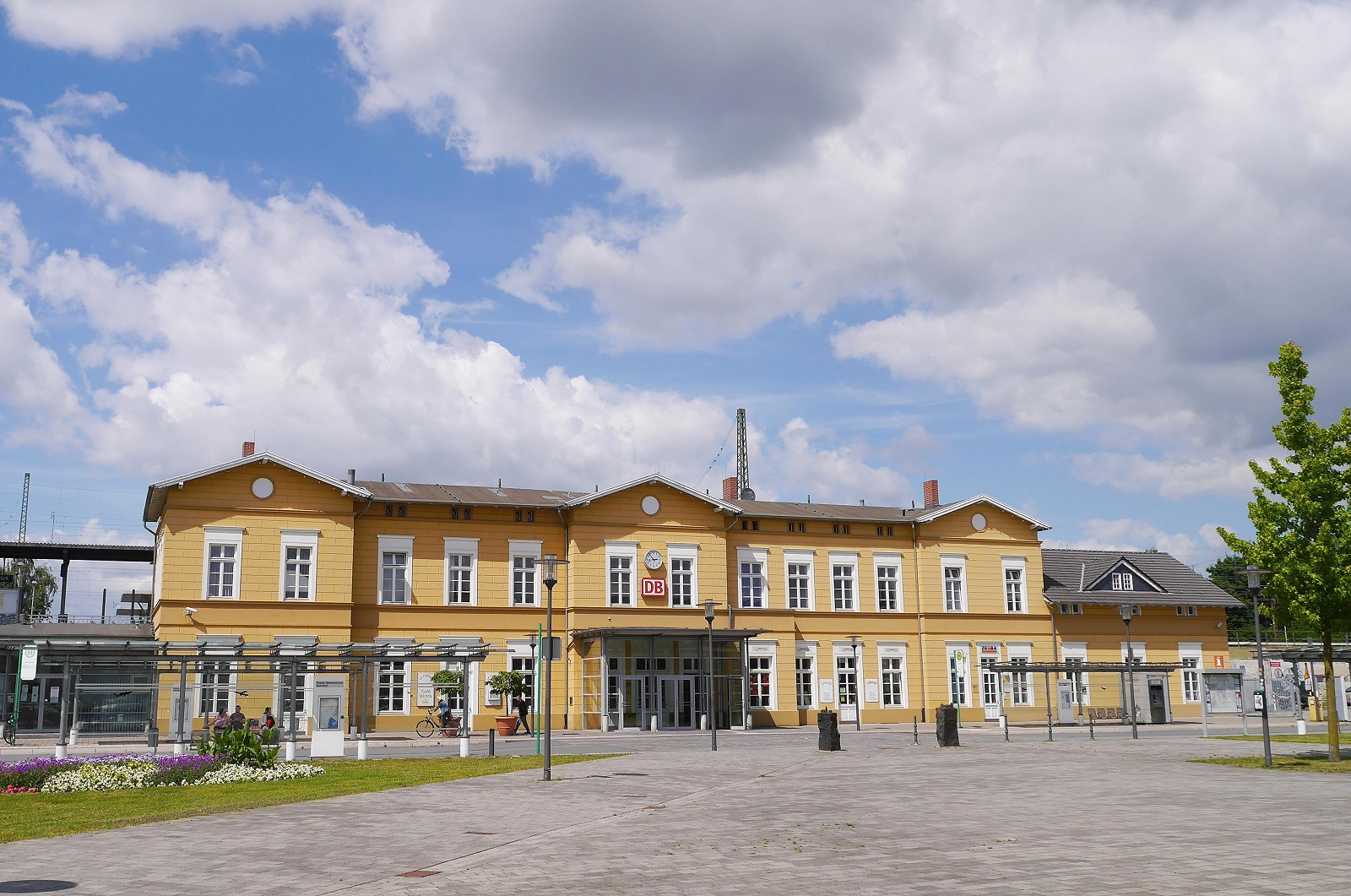 Bahnhof Rheda-Wiedenbrück mit Bahnhofsvorplatz